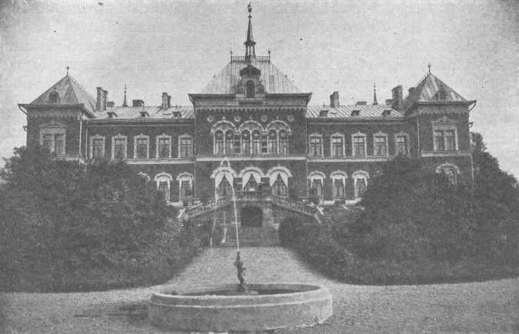 Malmgård i Pernå, Finland.